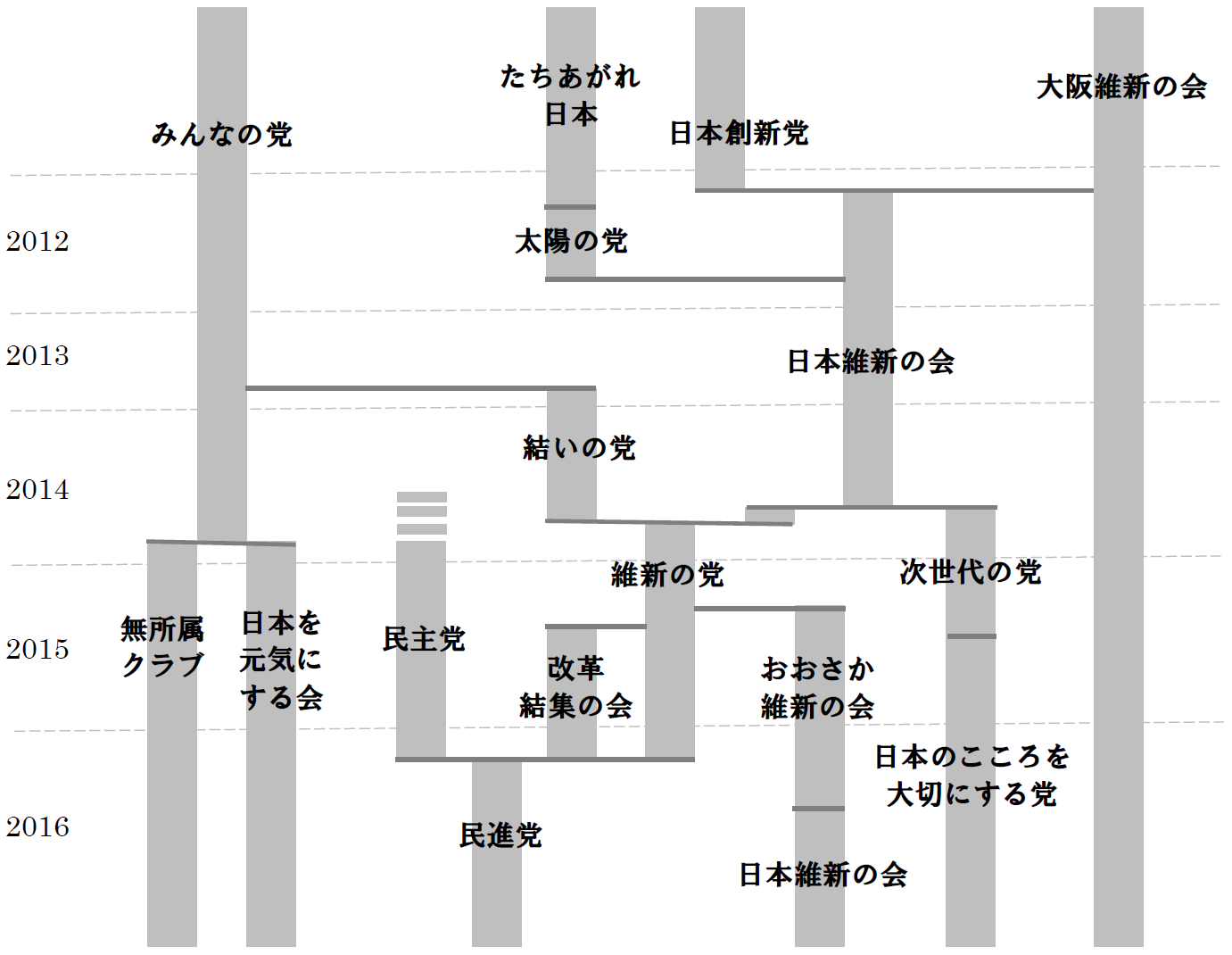 2010年代の日本における中小政党の離合集散（大阪維新の会, 日本創新党, たちあがれ日本, 太陽の党, 日本維新の会, みんなの党, 結いの党, 無所属クラブ, 日本を元気にする会, 次世代の党, 日本のこころを大切にする党, おおさか維新の会, 維新の党, 改革結集の会, 民主党, 民進党）